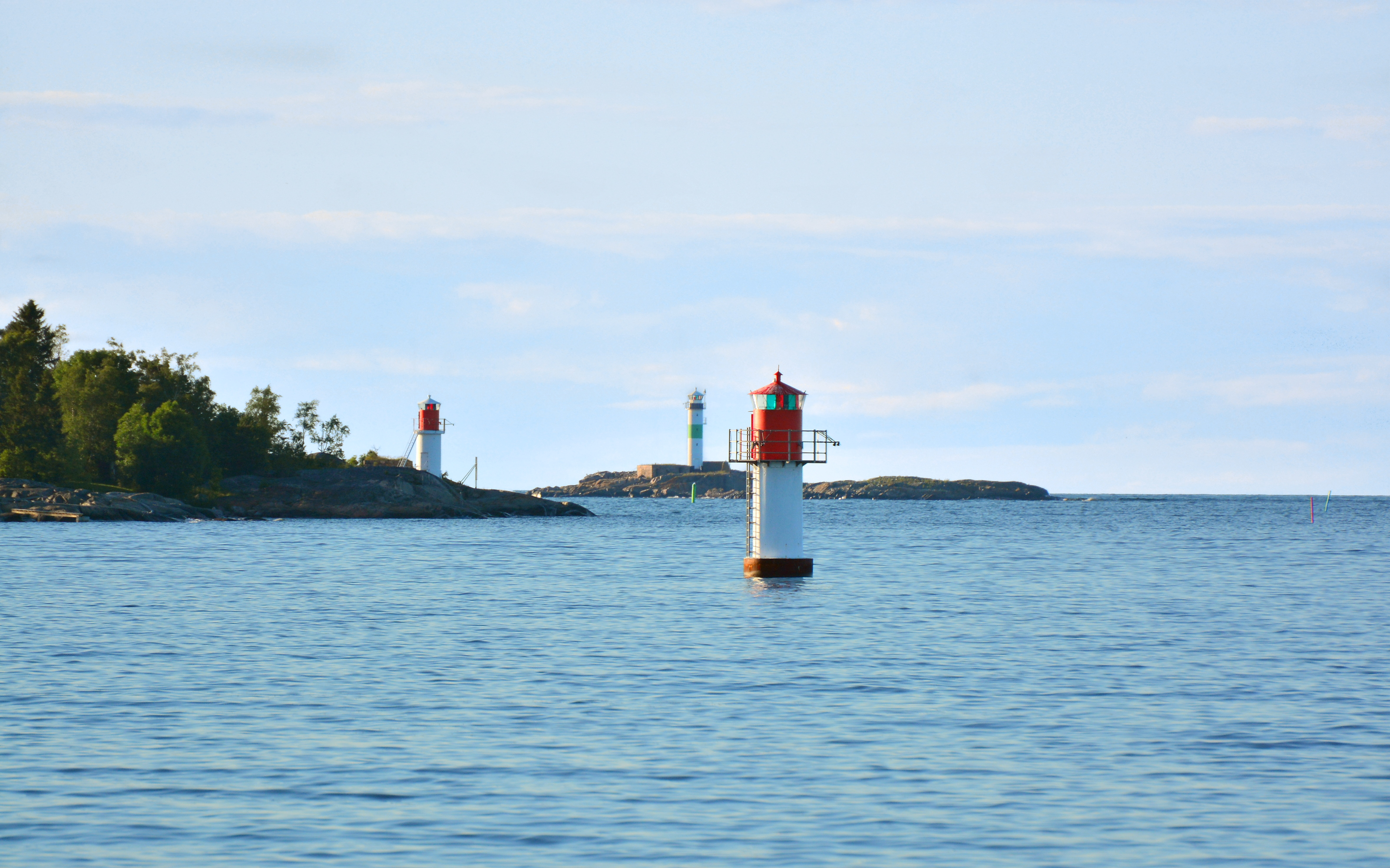 Tre fyrar vid Simpnäsleden. Till vänster Näskubben, i mitten Simpnäsklubb och till höger Simpnäsgrynnan.